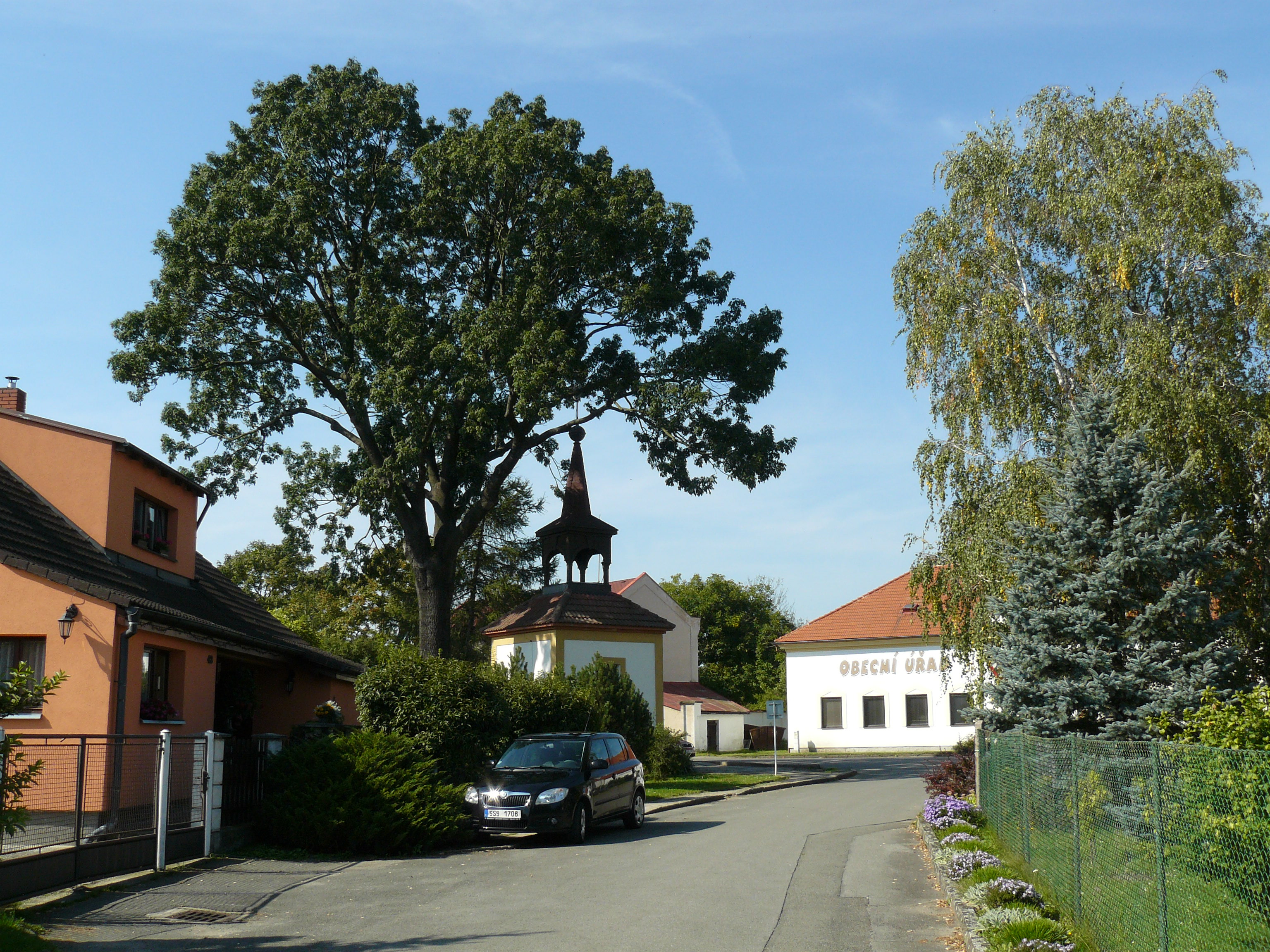 Dolní Stakory